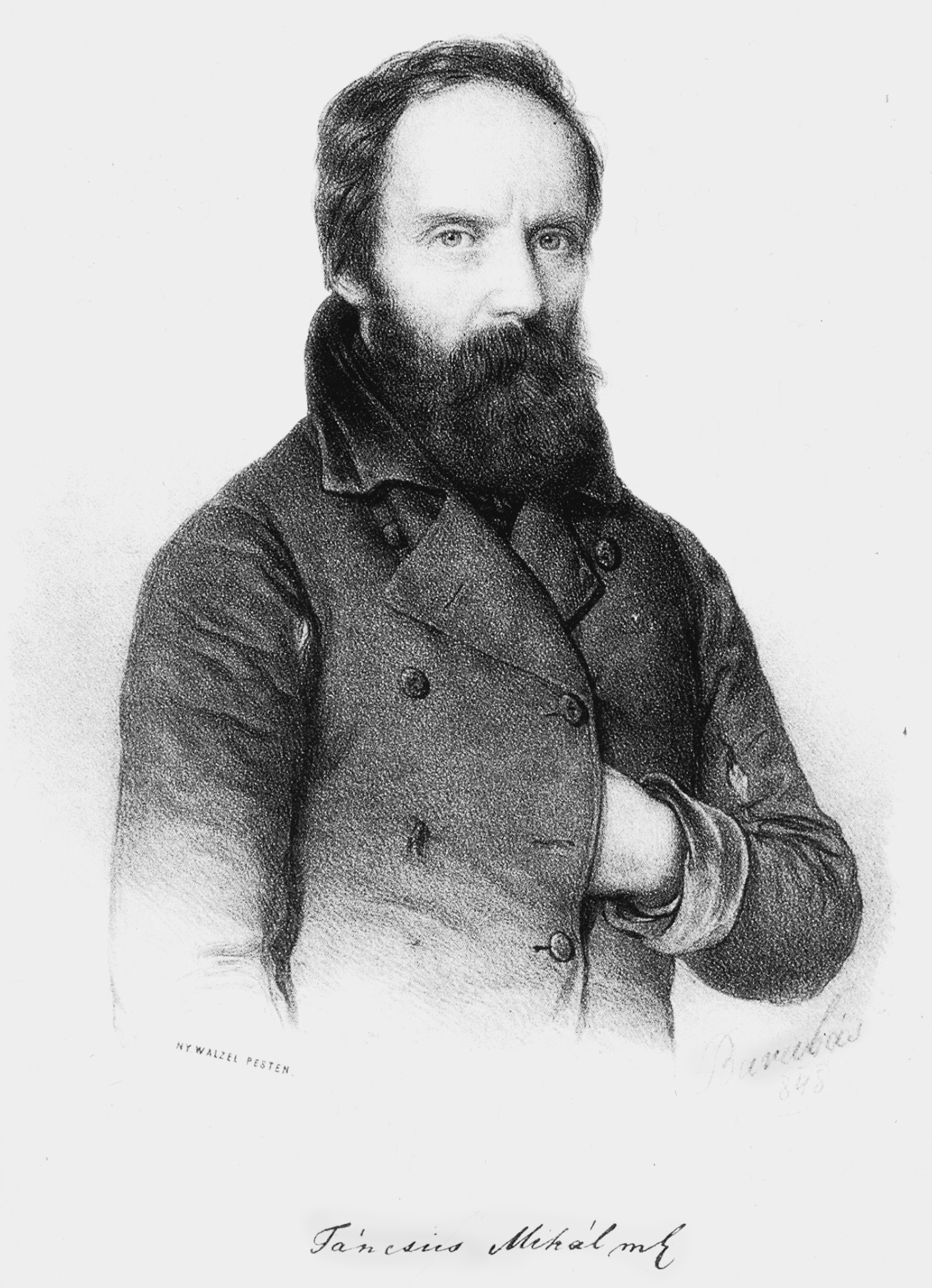 Táncsics Mihály (1799–1884) portréja. Barabás Miklós litográfiája